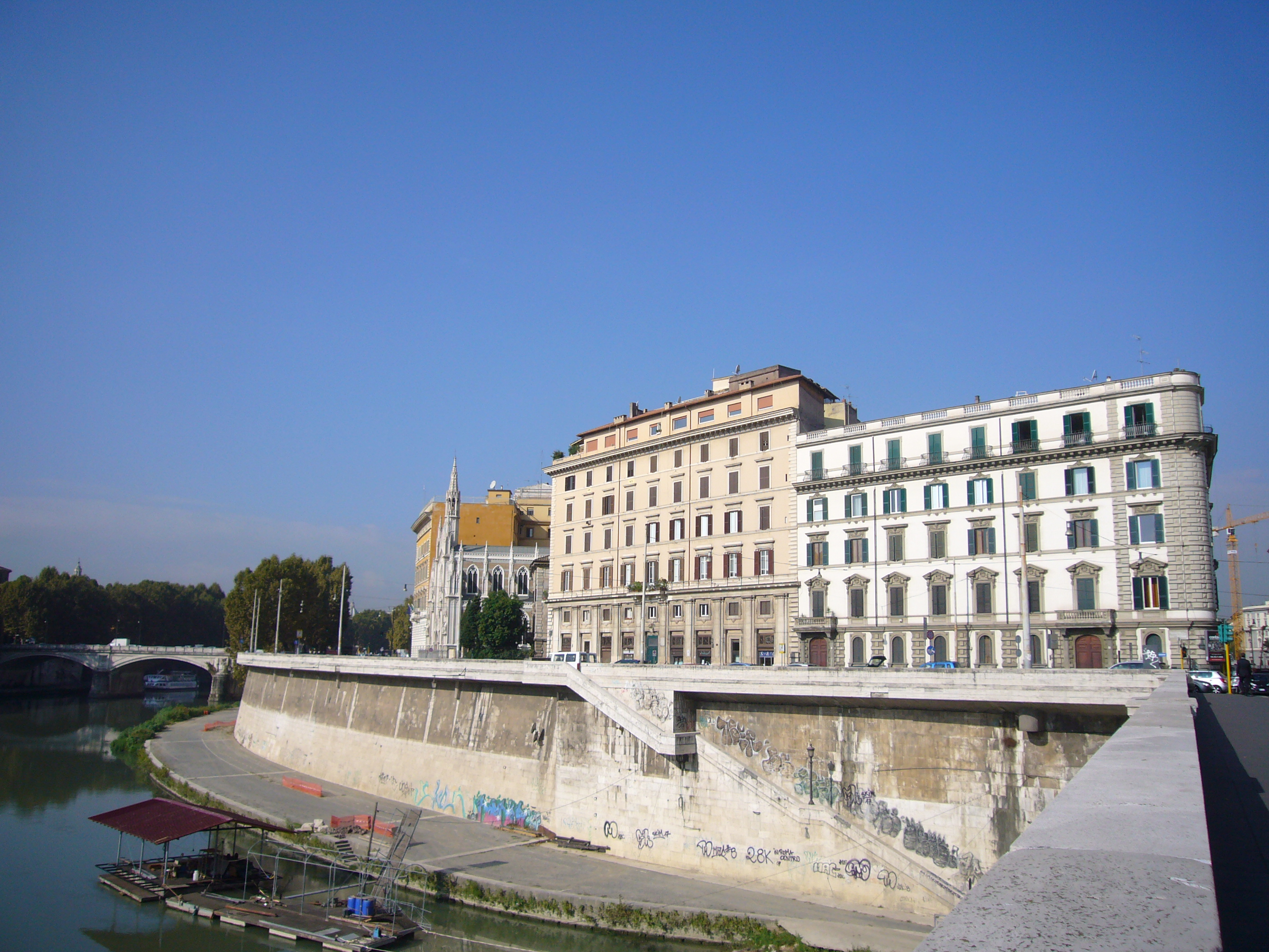 Roma, Lungotevere Prati e chiesa del Suffragio